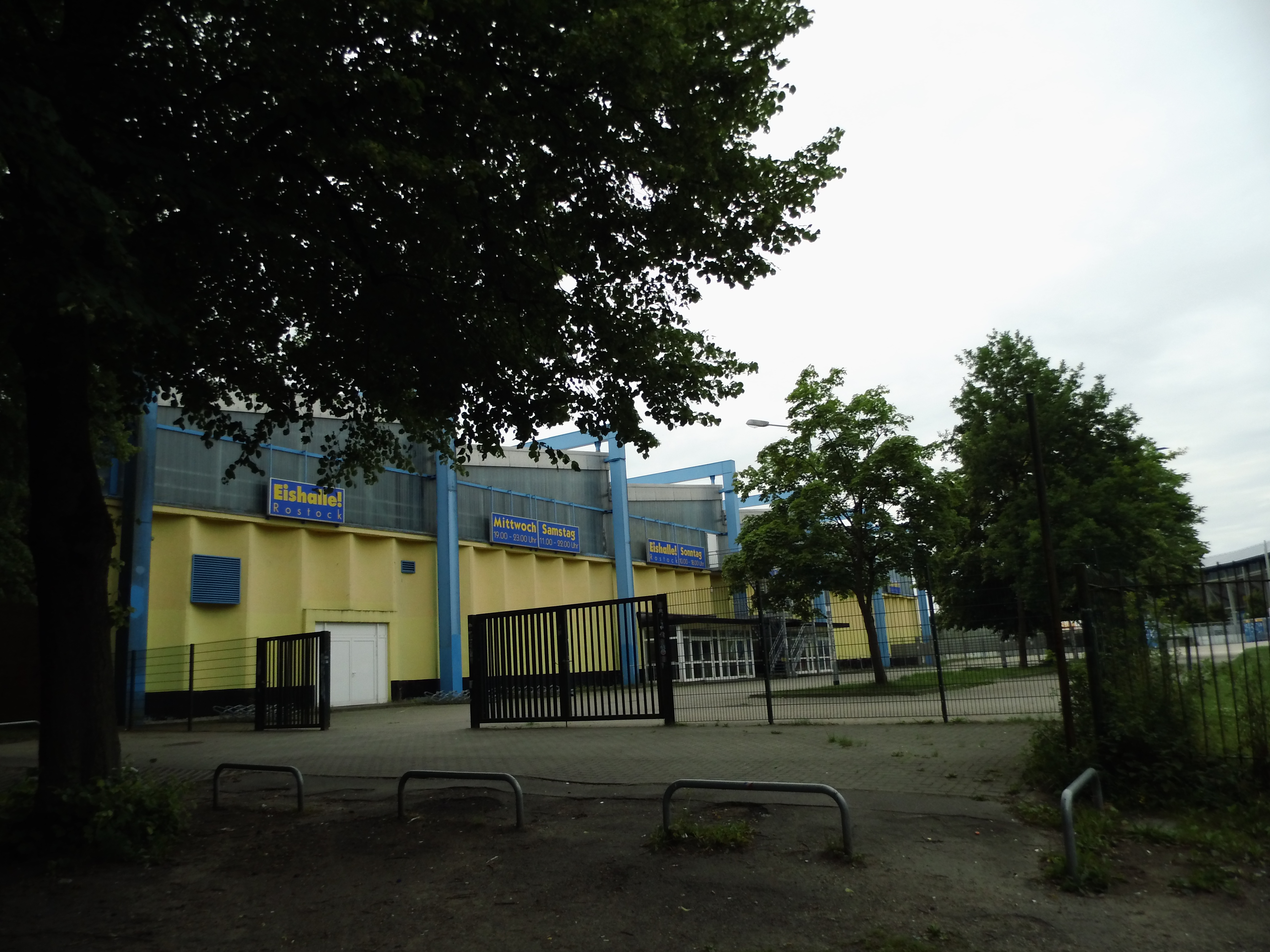 Eingang zur Rostocker Eishalle